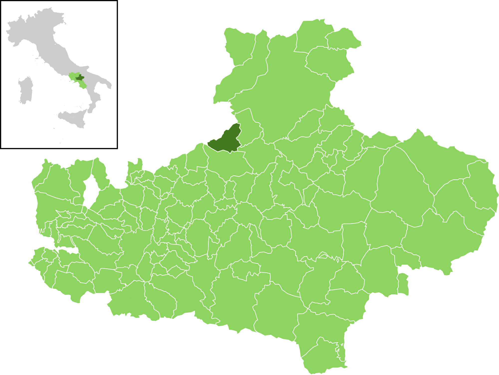 Il comune all'interno della provincia di Avellino